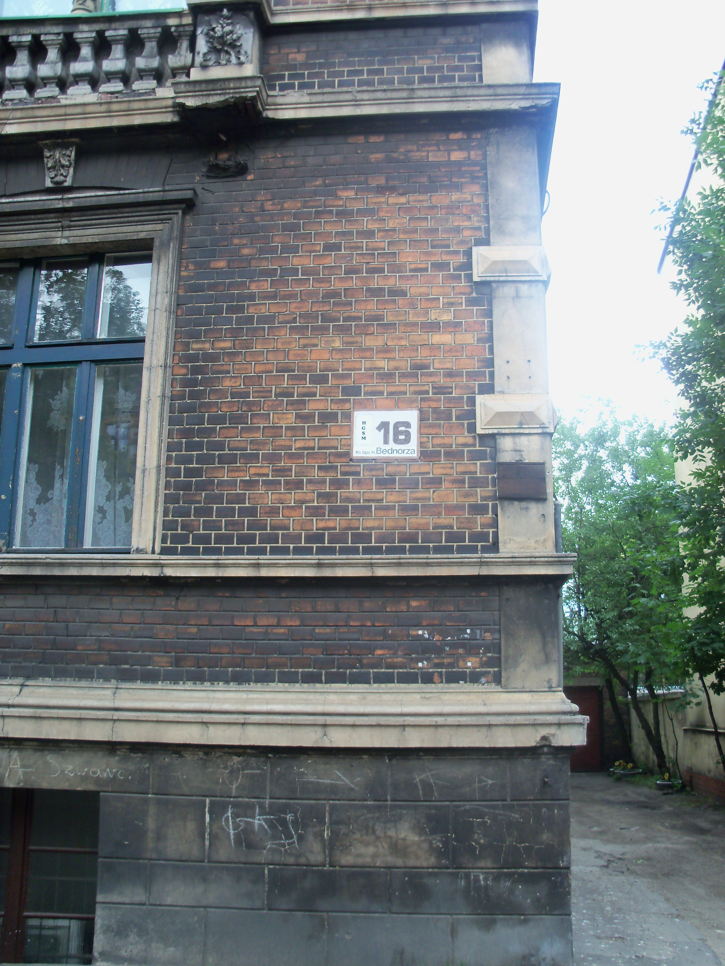 Katowice-Szopienice: ulica ks. bpa Herberta Bednorza - budynek pod numerem 16